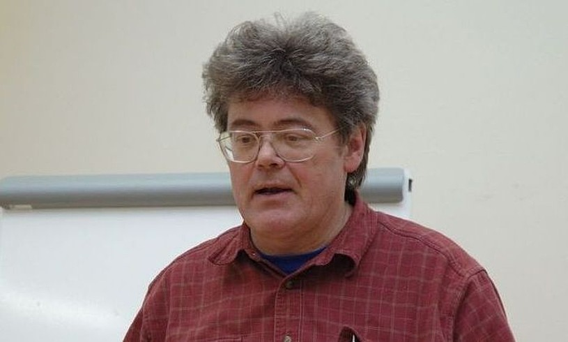 András Kornai ikertzailearen argazkia